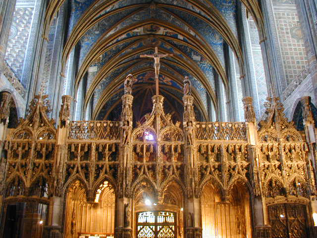 France, Tarn (81), Le Jubé de la cathédrale Saint-Cécile d'Albi